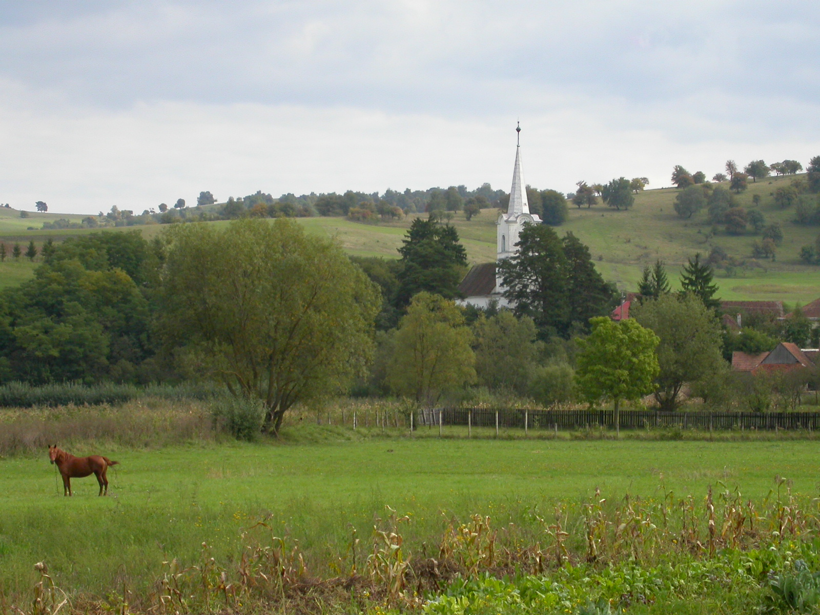 Biserica unitariană din Armășeni, 1783-1785